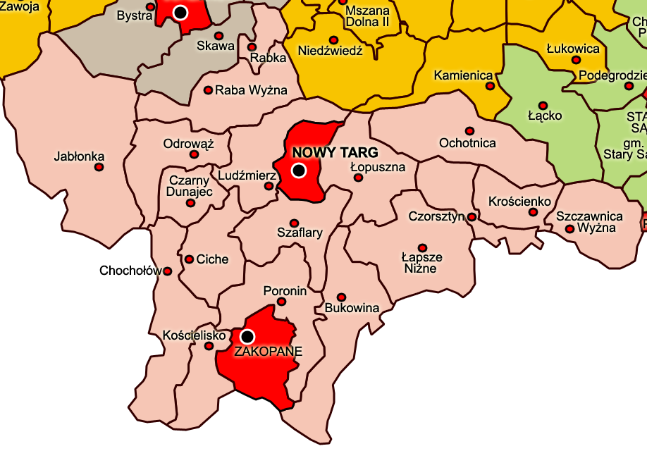 Повіт Новий Тарг 1938